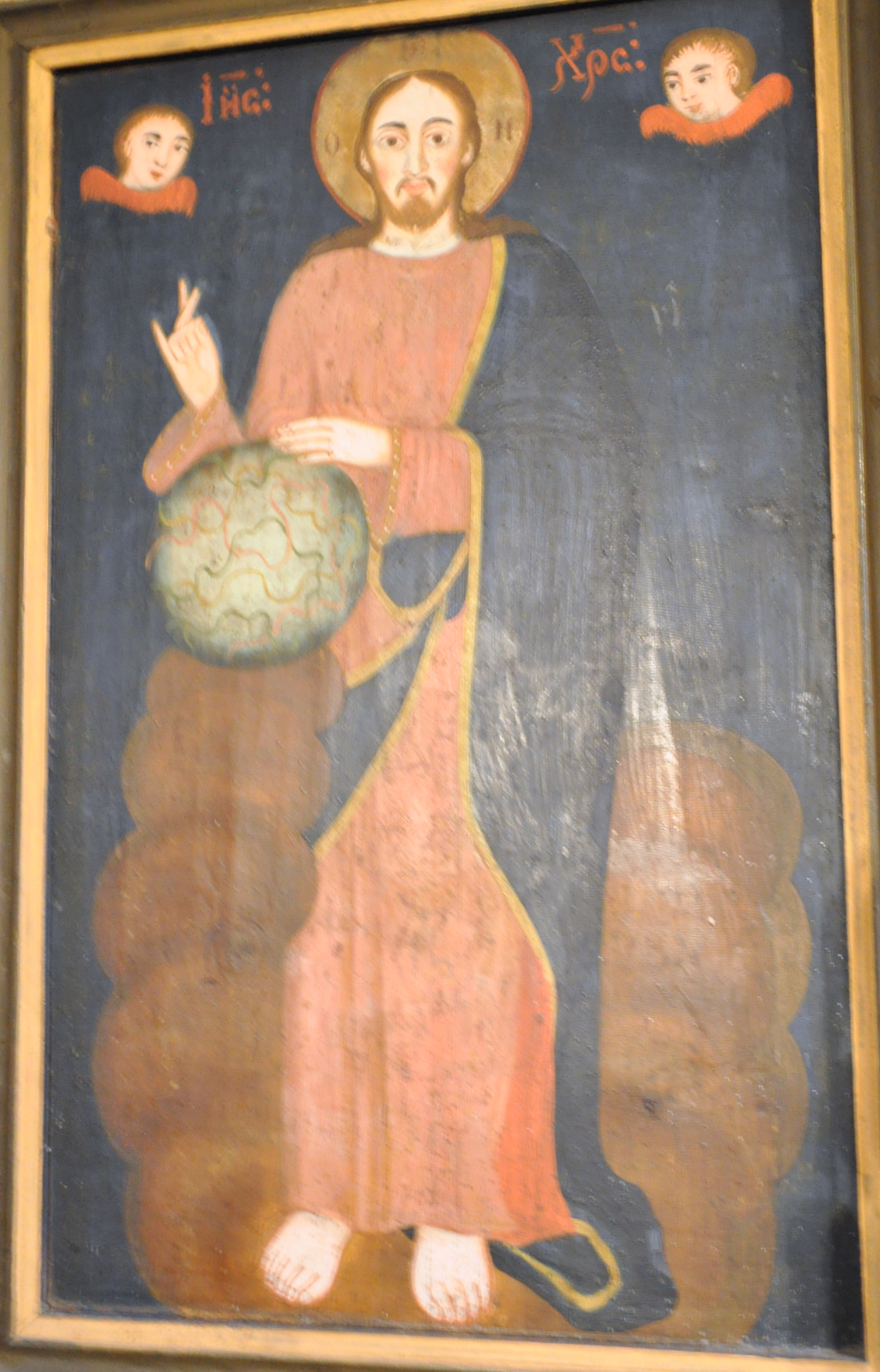 Biserica de lemn "Cuvioasa Paraschiva", sat DOBREŞTI; comuna BARA